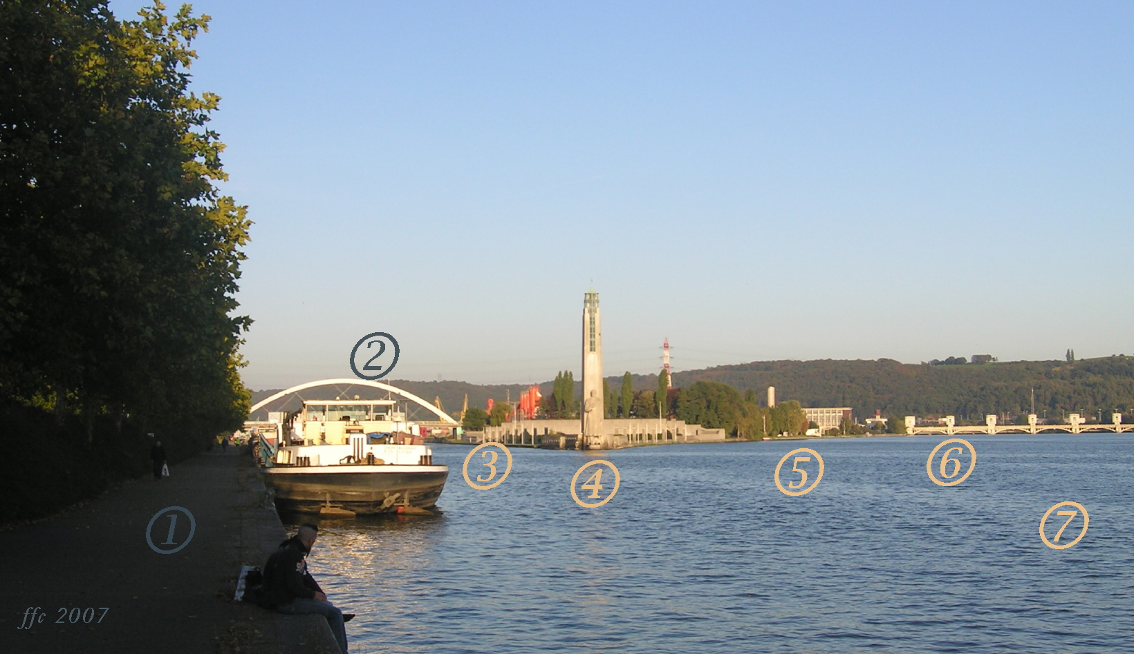 inici canal albert, monument i Mosa